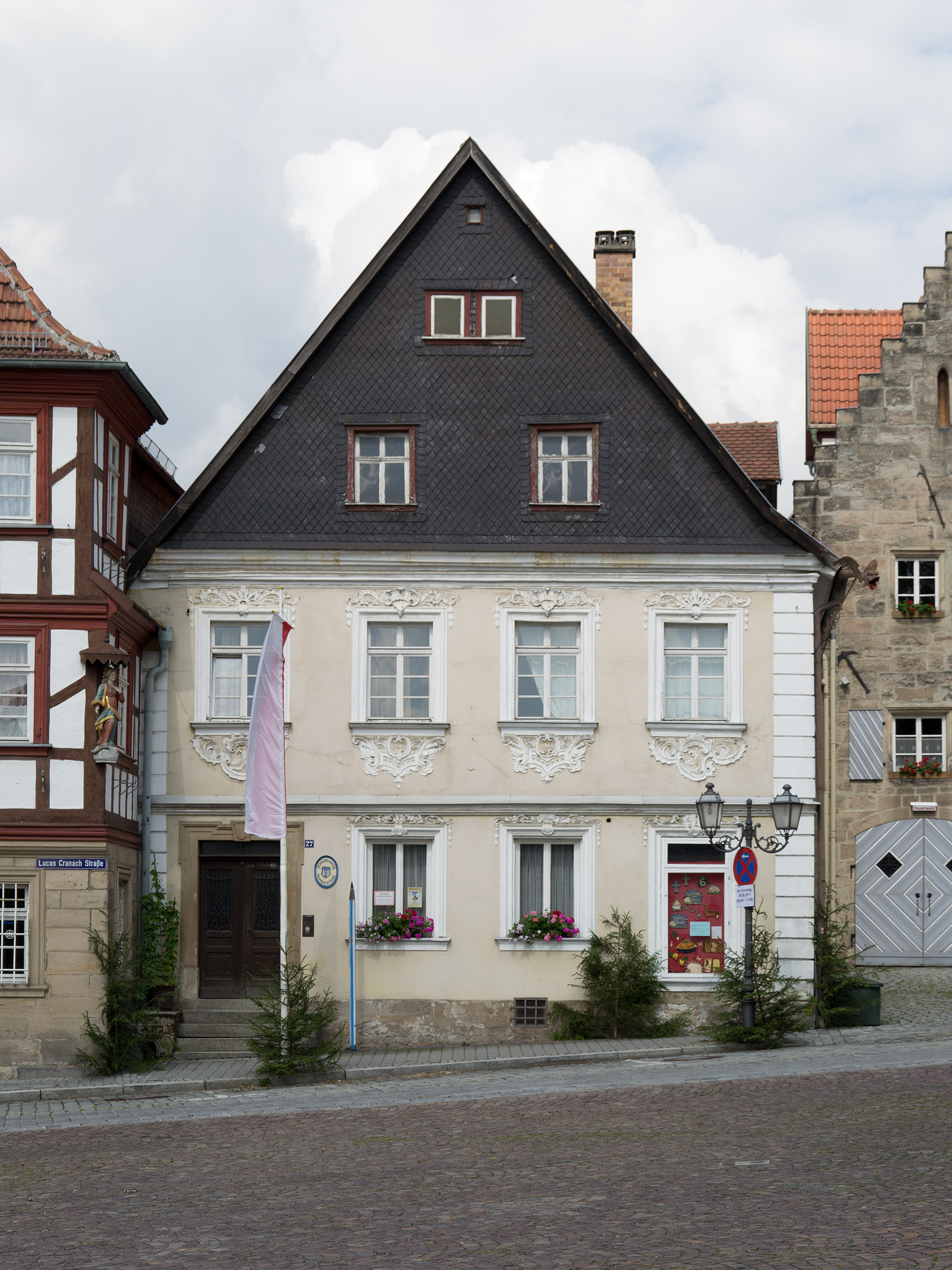 Lucas-Cranach-Straße 27 in Kronach, sog. Fiedlershaus